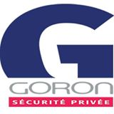 Identité visuelle de la société